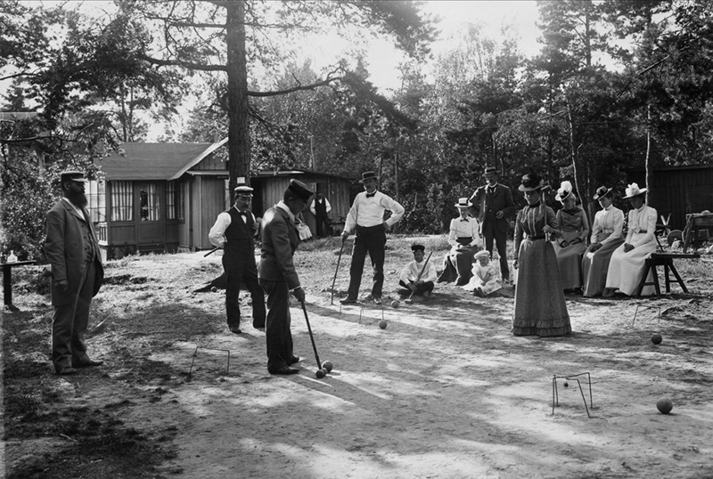 Män och kvinnor spelar krocket framför hus på Lidingö.